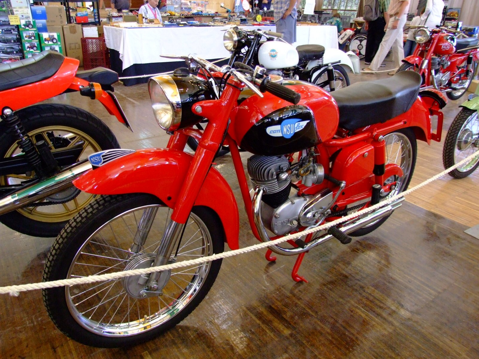 Quelle: selbst fotografiert, 07/2006 Fotograf: Späth Chr.